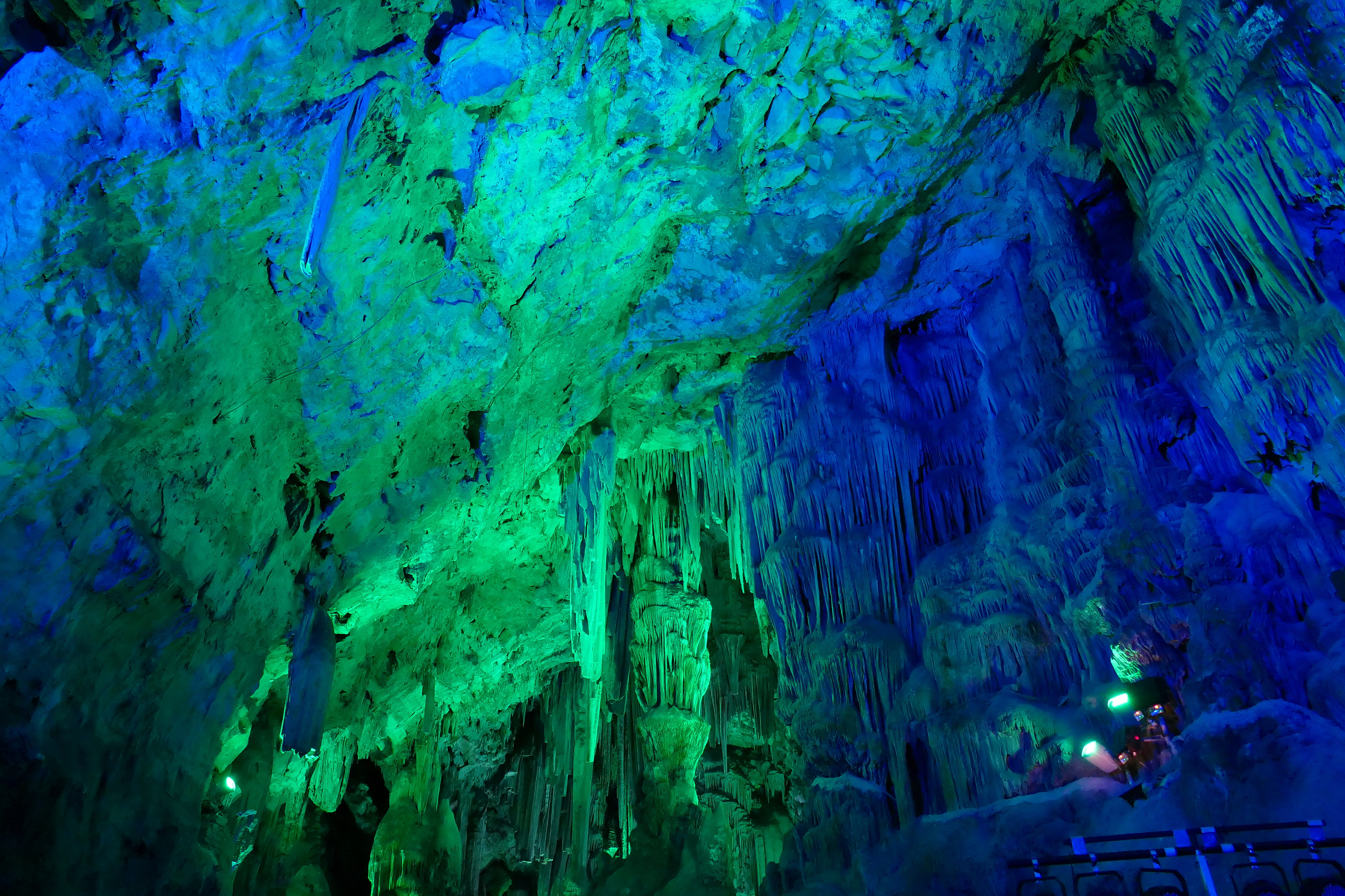 Tropfsteinhöhle St. Michael's Cave auf Gibraltar